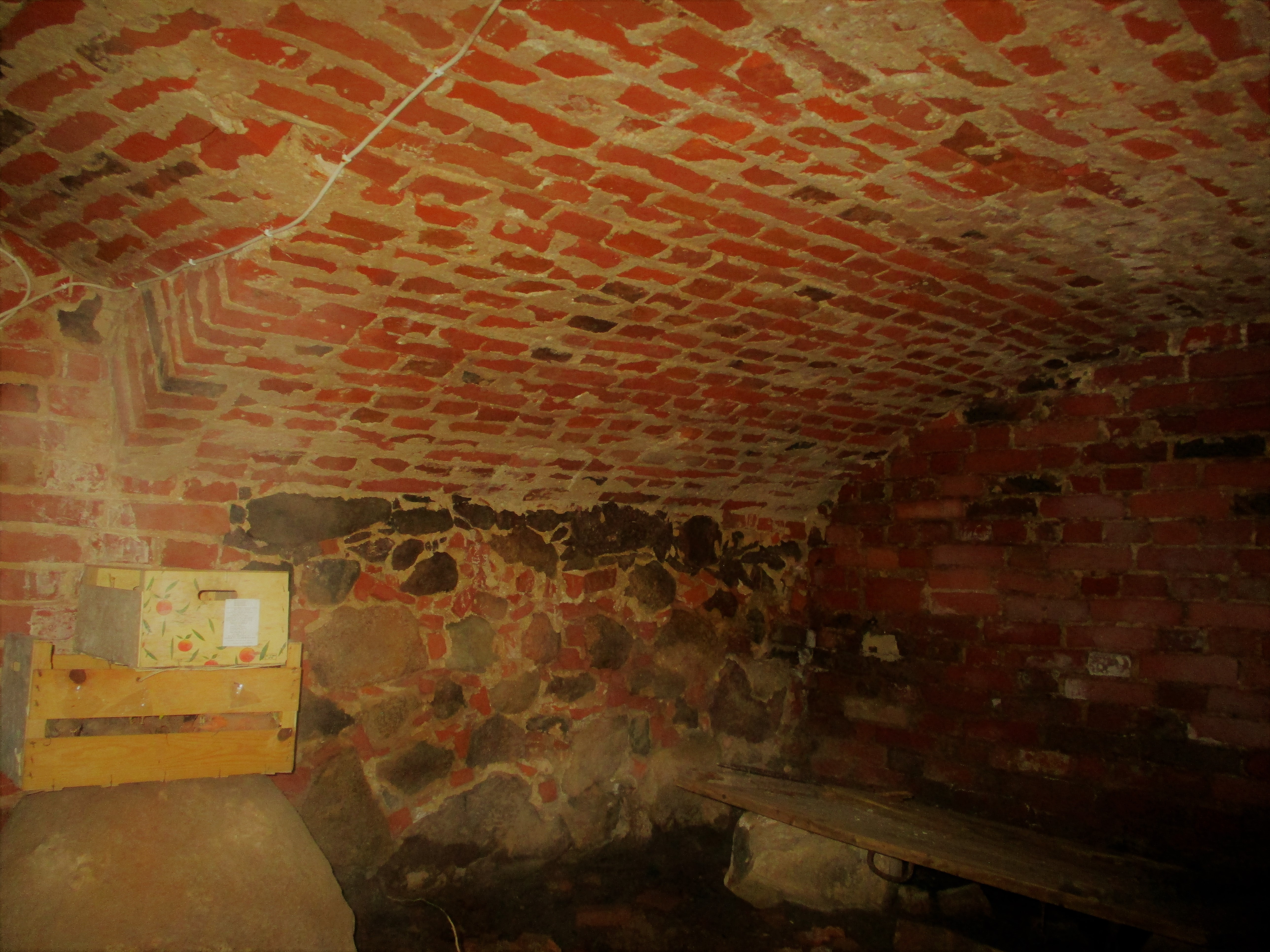 Vaade läänesuunast mõisa peahoone edelapoolsele keldriruumile.